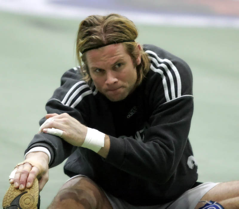 Per Thomas Linders am 30. Dezember 2006 in der Aschaffenburger Unterfrankenhalle vor dem Spiel TV Großwallstadt - THW Kiel (25:30)